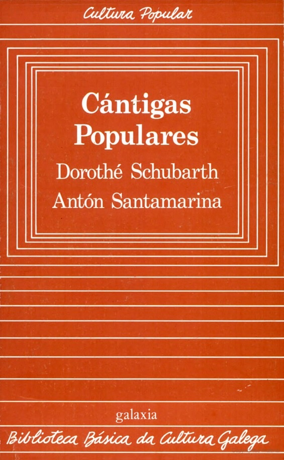 Biblioteca Básica da Cultura Galega, 19, Cántigas populares, Dorothé Schubarth e Antón Santamarina.jpg